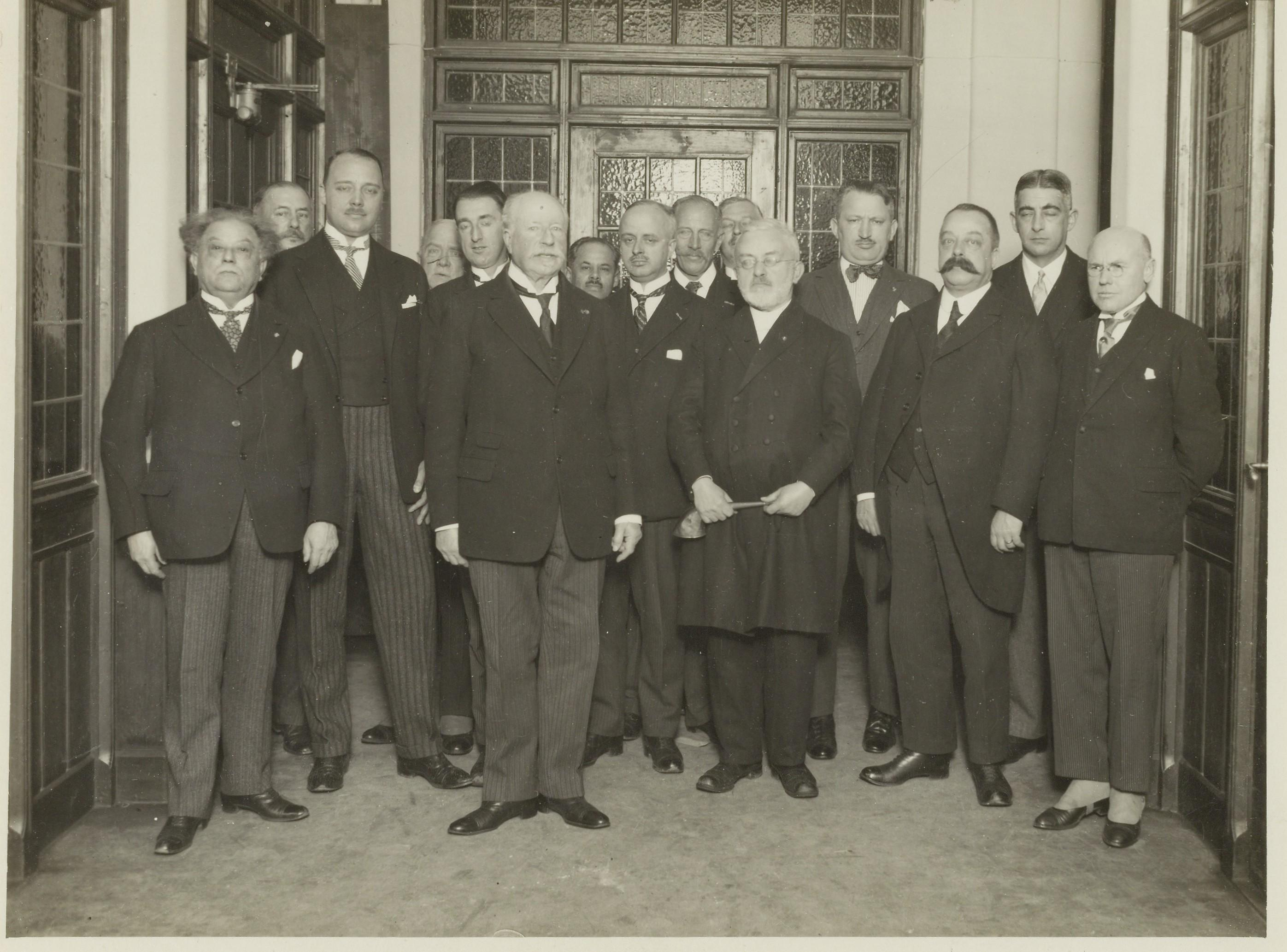 Beschrijving Groepsportret van een commissie uit de abonnees van het Algemeen Handelsblad Op de eerste rij, van links naar rechts, E. Gerzon, S.P. van Eeghen, R.E. Kielstra, opperrabijn A.S. Onderwijzer, oud-minister Folkert Posthuma. Documenttype foto Vervaardiger Onbekend Anoniem Collectie Collectie Stadsarchief Amsterdam: foto-afdrukken Datering 5 januari 1928 Geografische naam Nieuwezijds Voorburgwal Inventarissen Afbeeldingsbestand ANWN00013000001